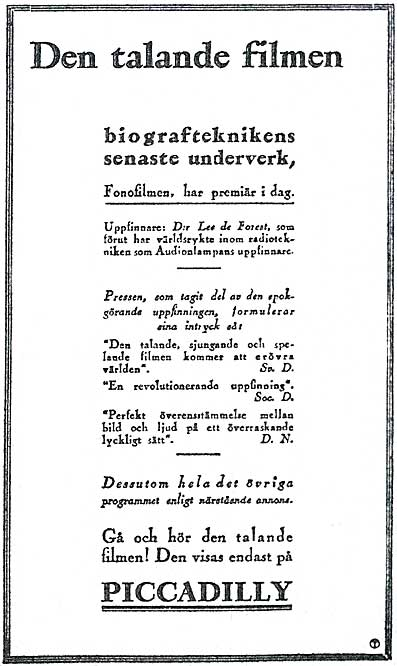 Fonofilm på Piccadilly annons i Dagens Nyheter